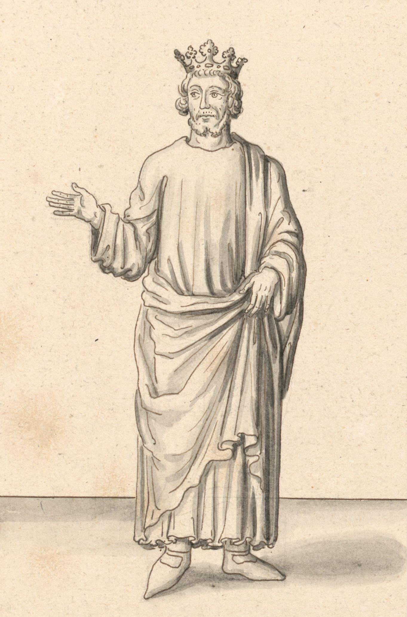 Figure de prince représenté debout et couronné : Charles Martel